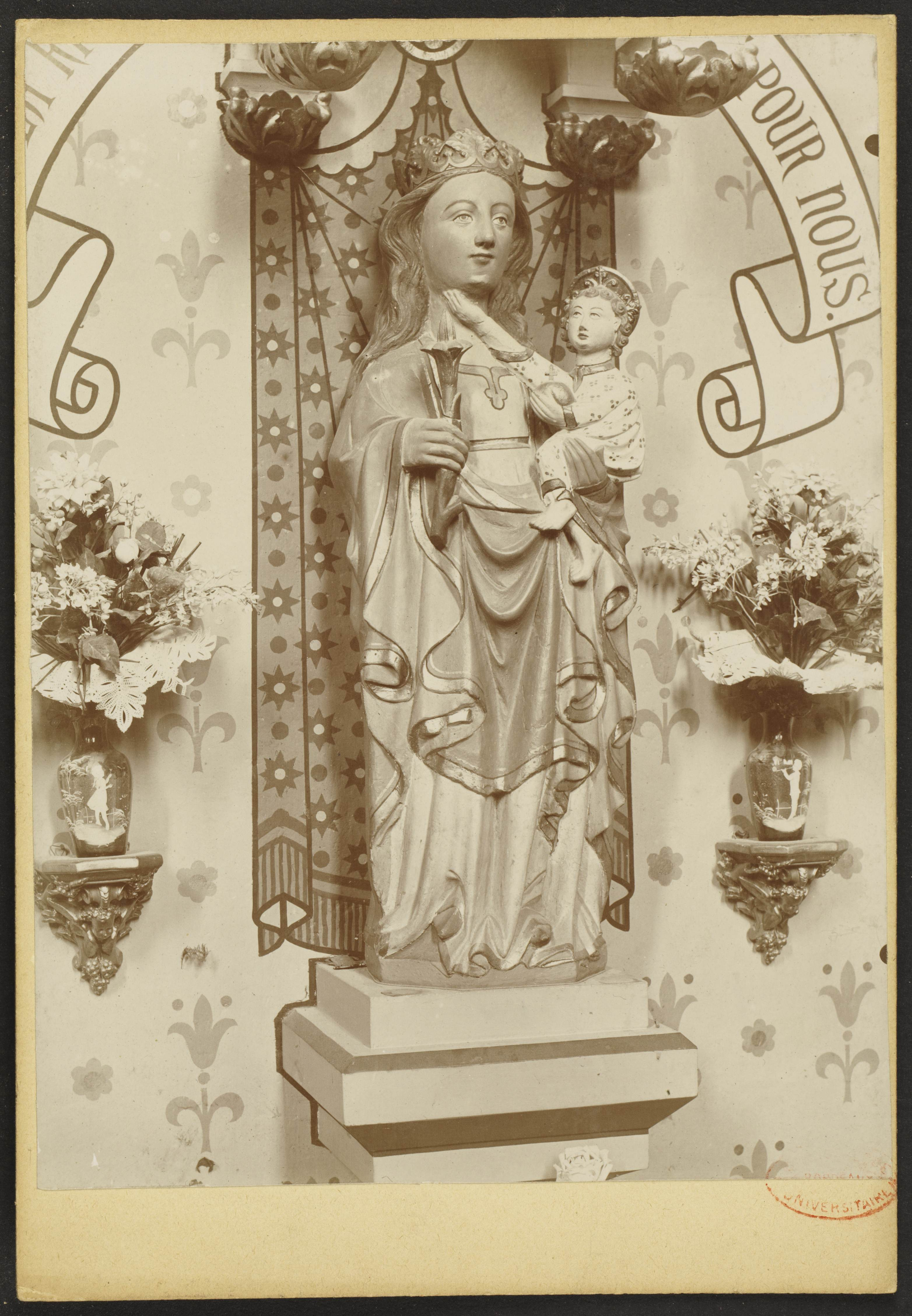 vierge et enfant; sujet : La Rivière